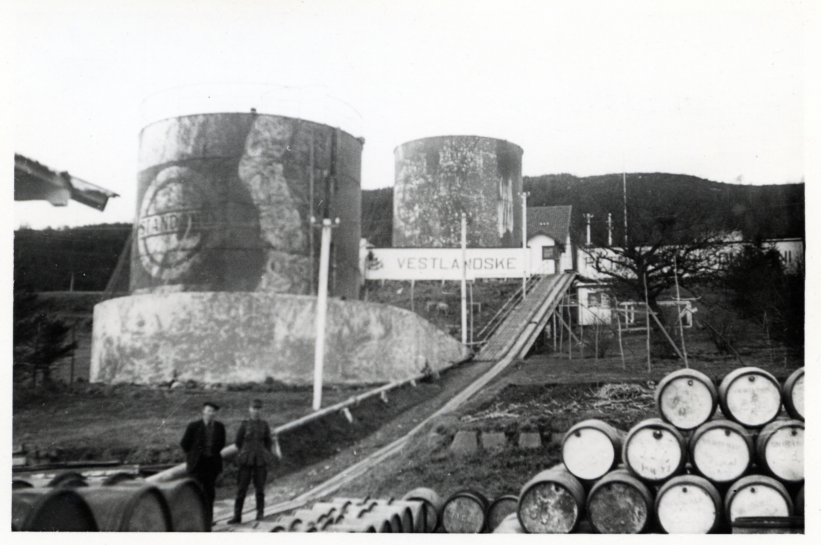 Bildet er hentet fra Arkivverket. Vestlandske Petroleumskompani/Esso tankanlegg under andre verdenskrig. Foto tatt av de tyske militære troppene i Norge. Arkivinstitusjon : Statsarkivet i Stavanger Arkivnavn : Pa 1761 - Statoil Fuel and Retail Norge AS Sted : Norge, Møre og Romsdal, Ålesund, Emneord: Esso, Olje, Petroleum, Tankanlegg, VPC Avbildet: Personen til venstre er antakelig Bernt Sulebust som var bestyrer på anlegget på Nørve i Ålesund før, under og etter krigen. Bildet er antakelig tatt etter 1941 da han slapp ut fra Grini som en av "Møregislene" etter en av hans sønner rømte til England. (lagt til av Bernt Sulebust jr.).